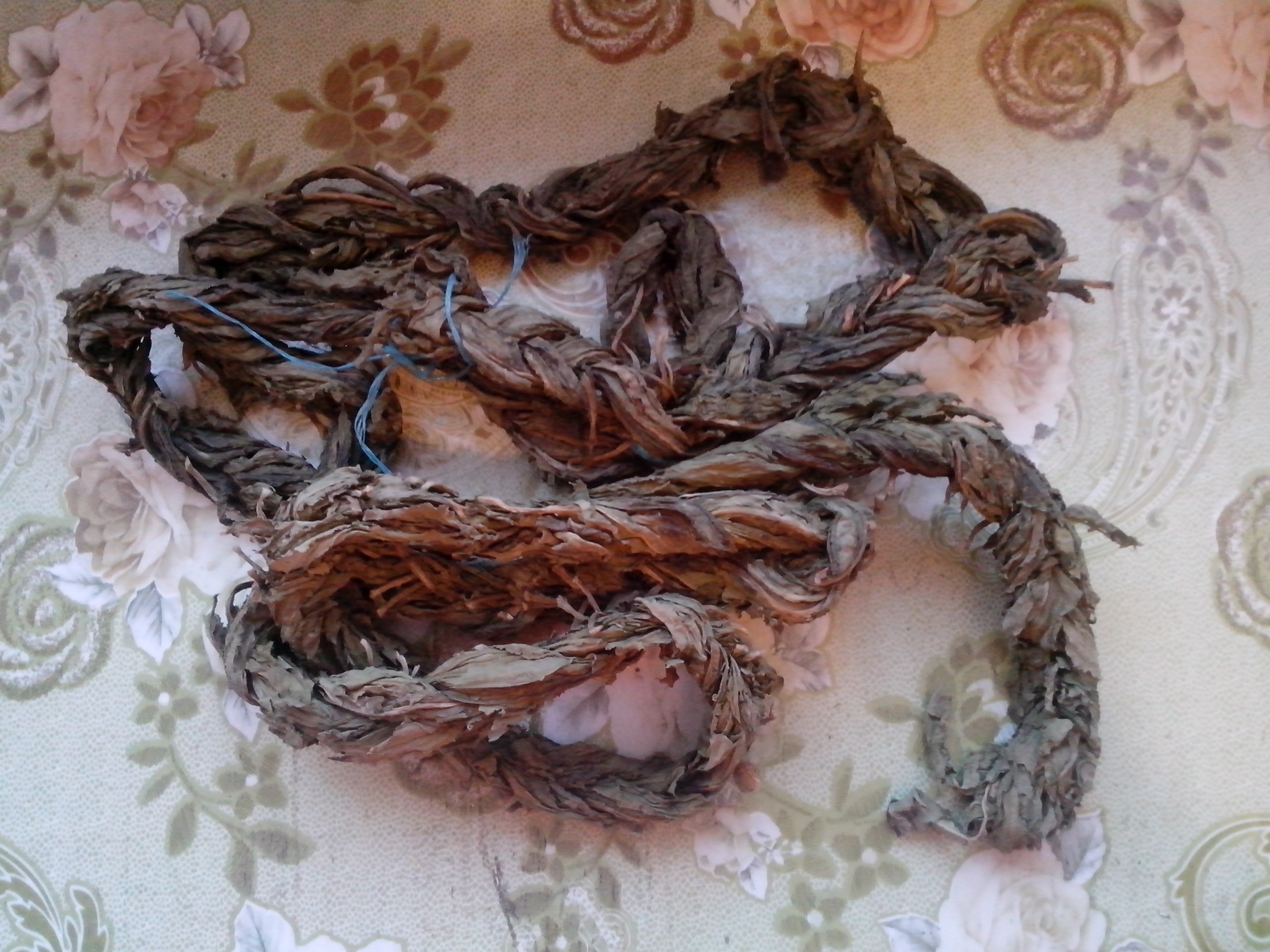 Cek kəndində hazırlanmış əvəlik